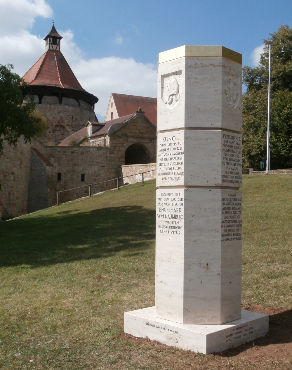 Ellwangen - Stauferstele am Ellwanger Schloss